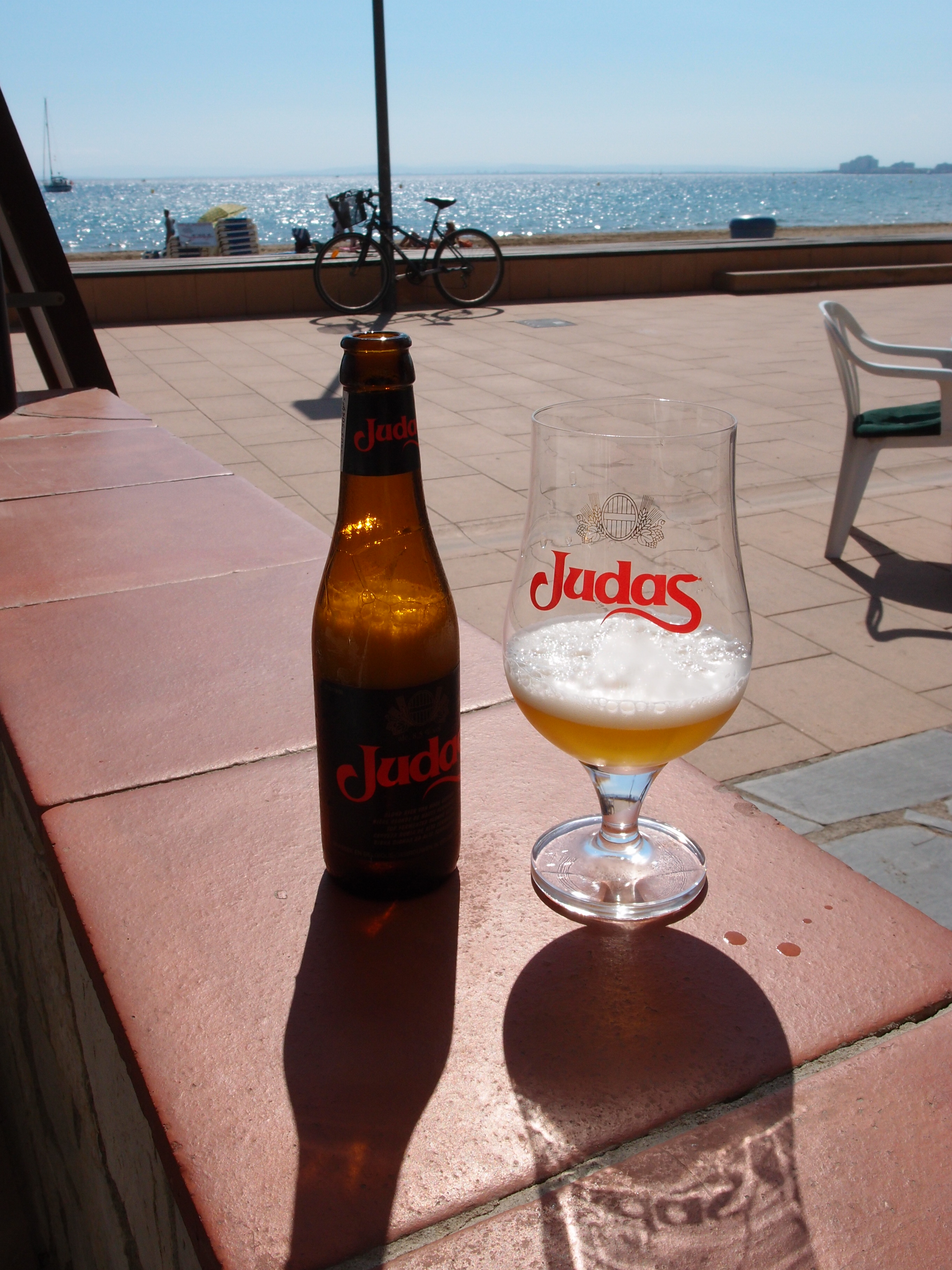 Judas - belgische Biermarke Datum: 16.09.2011 Urheber: M. Pfeiffer alias Benutzer:Gordito1869 Quelle: privates Fotoarchiv des Urhebers